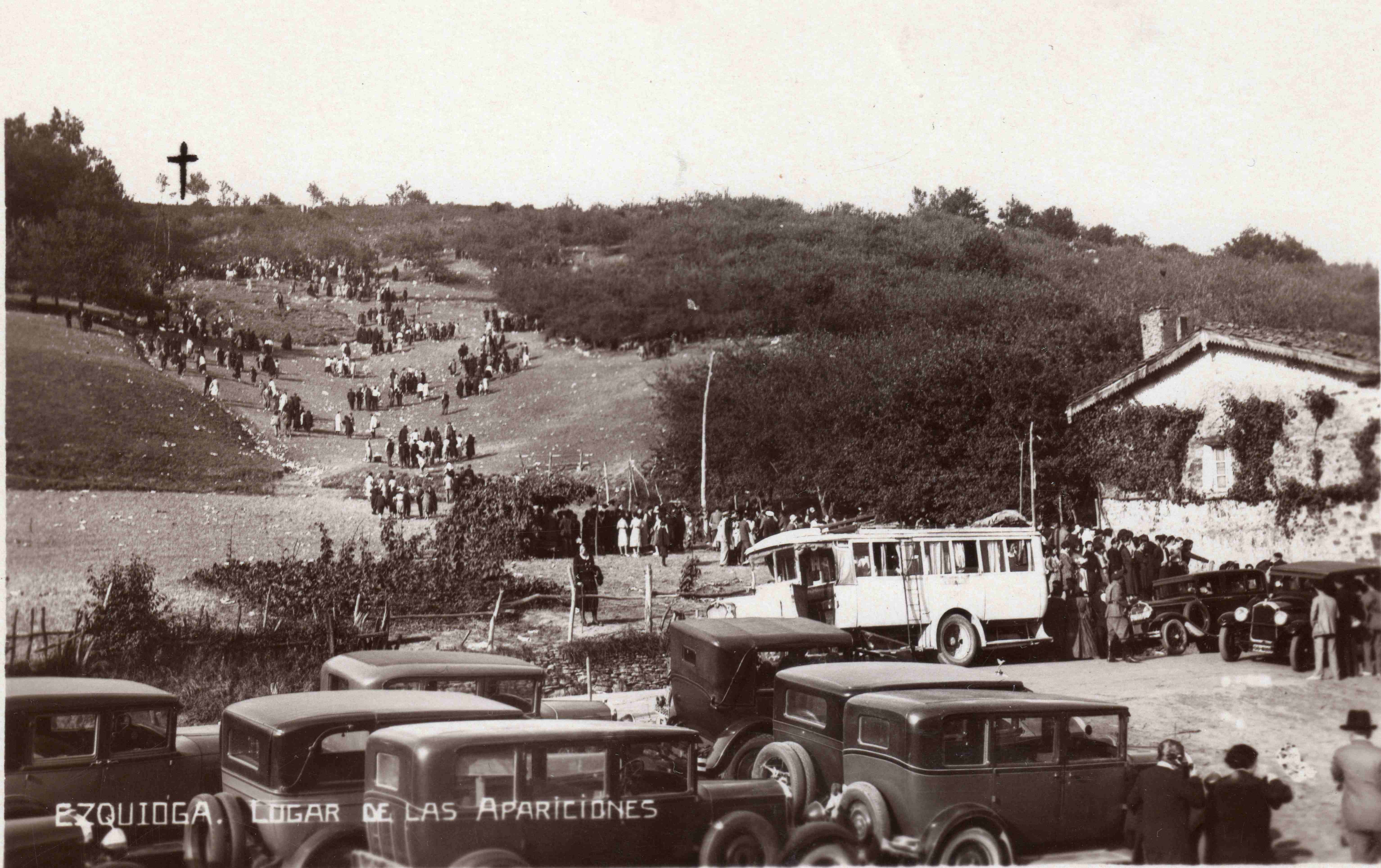 Ezkioko (Gipuzkoa) agerkundeen lekuan, jendetza (1931)